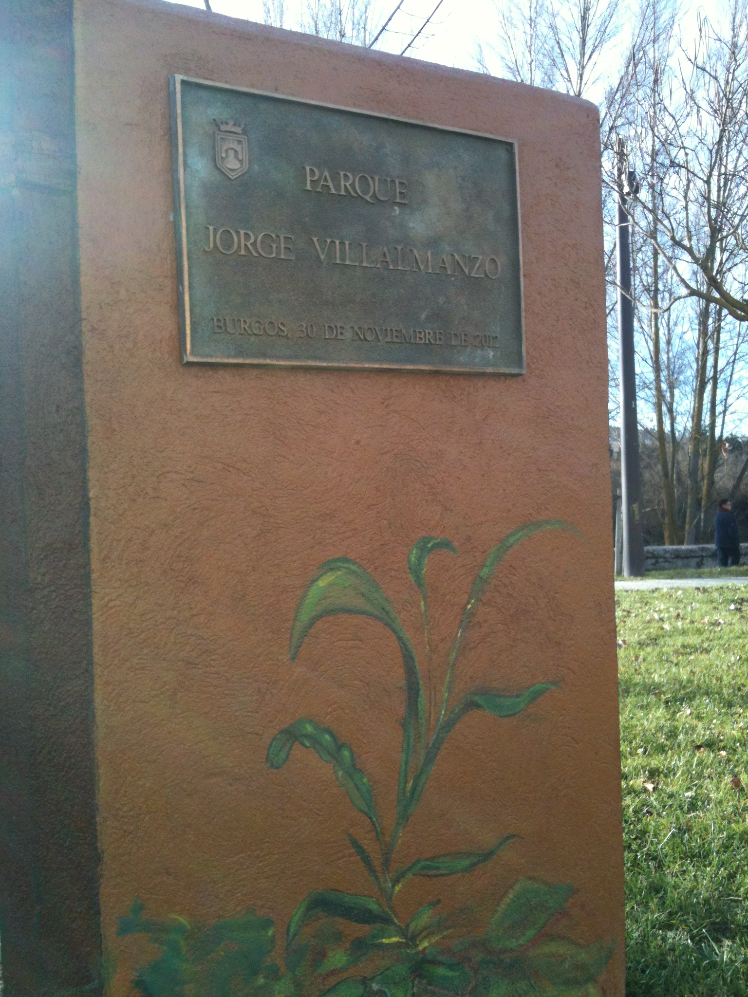 Burgos, Parque de Jorge Villalmanzo, 2 de enero de 2015.